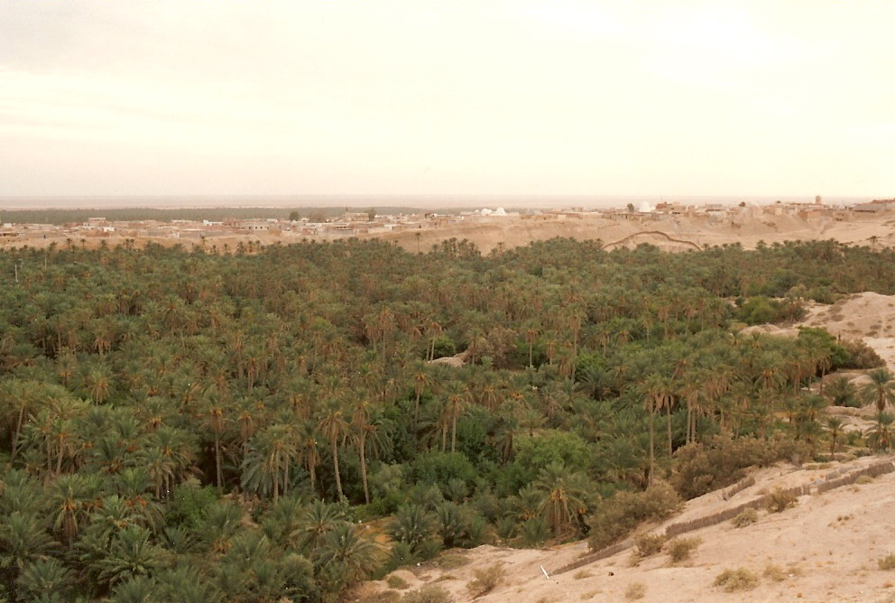 Vue de la corbeille de Nefta (Tunisie)